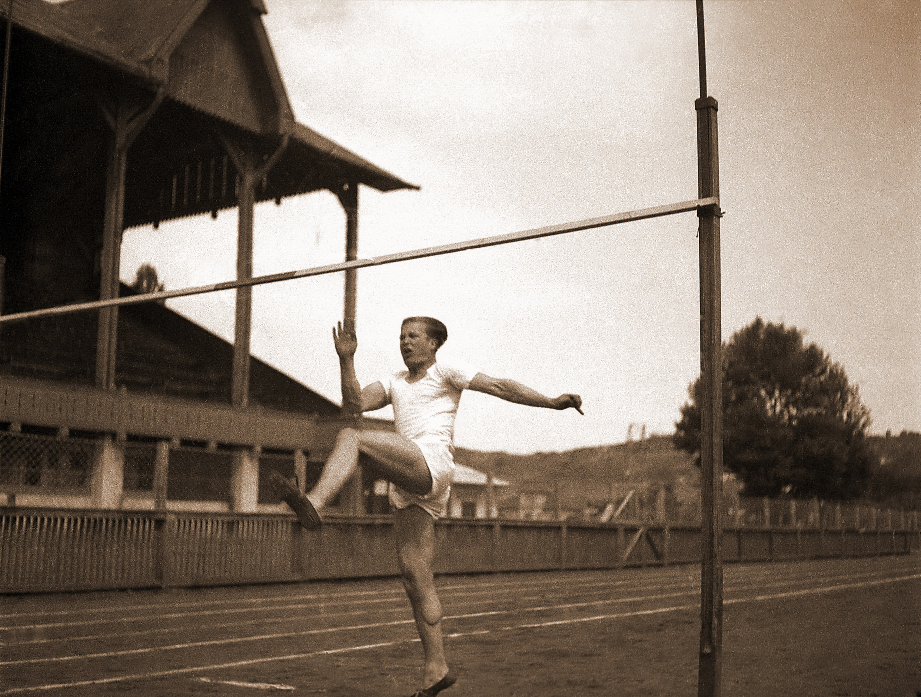 antrenament